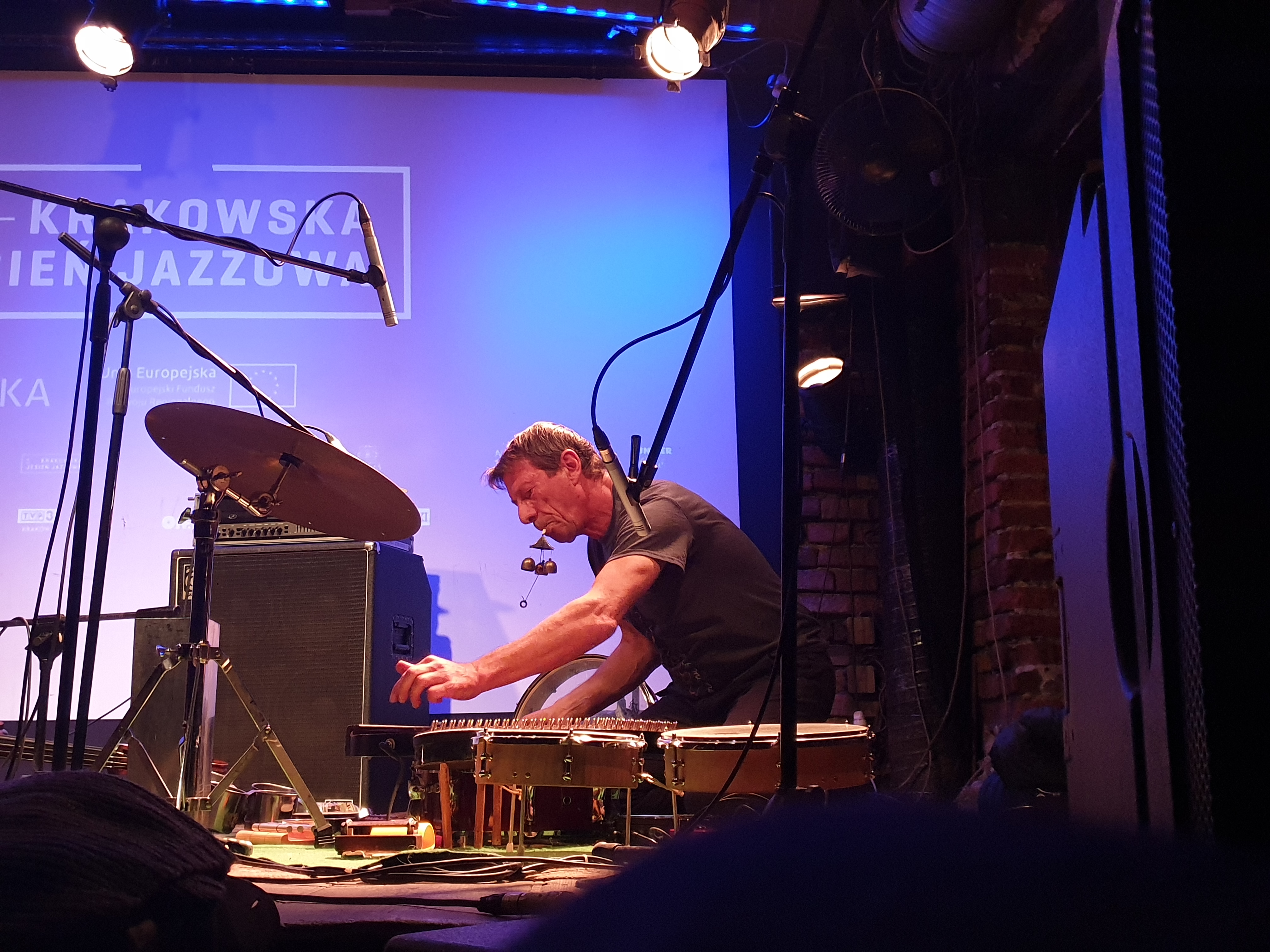 Zlatko Kaučič in concerto